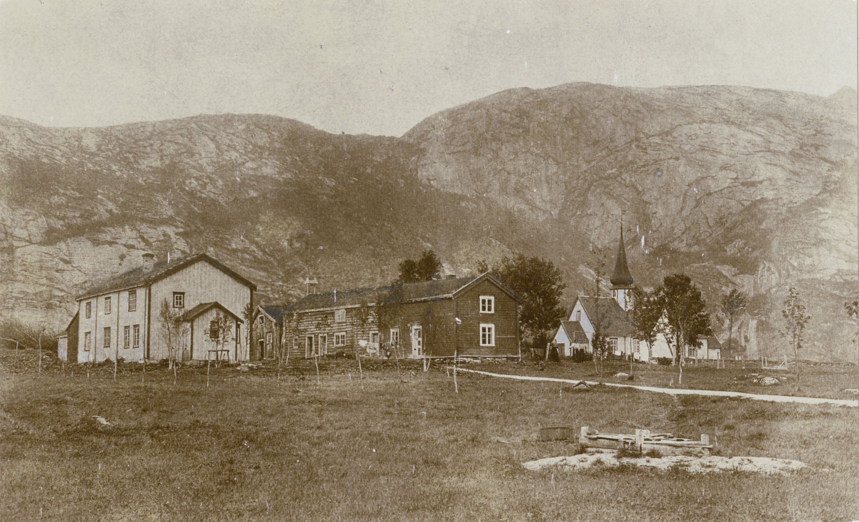 Rørstad kirke og prestegård i Sørfold, Nordland This image on crowdsourcing geotagging platform Fotodugnad